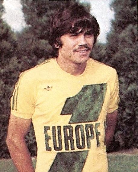 Guy Lacombe en 1979 (FC Nantes), 'Football 79', Panini figurina n°175